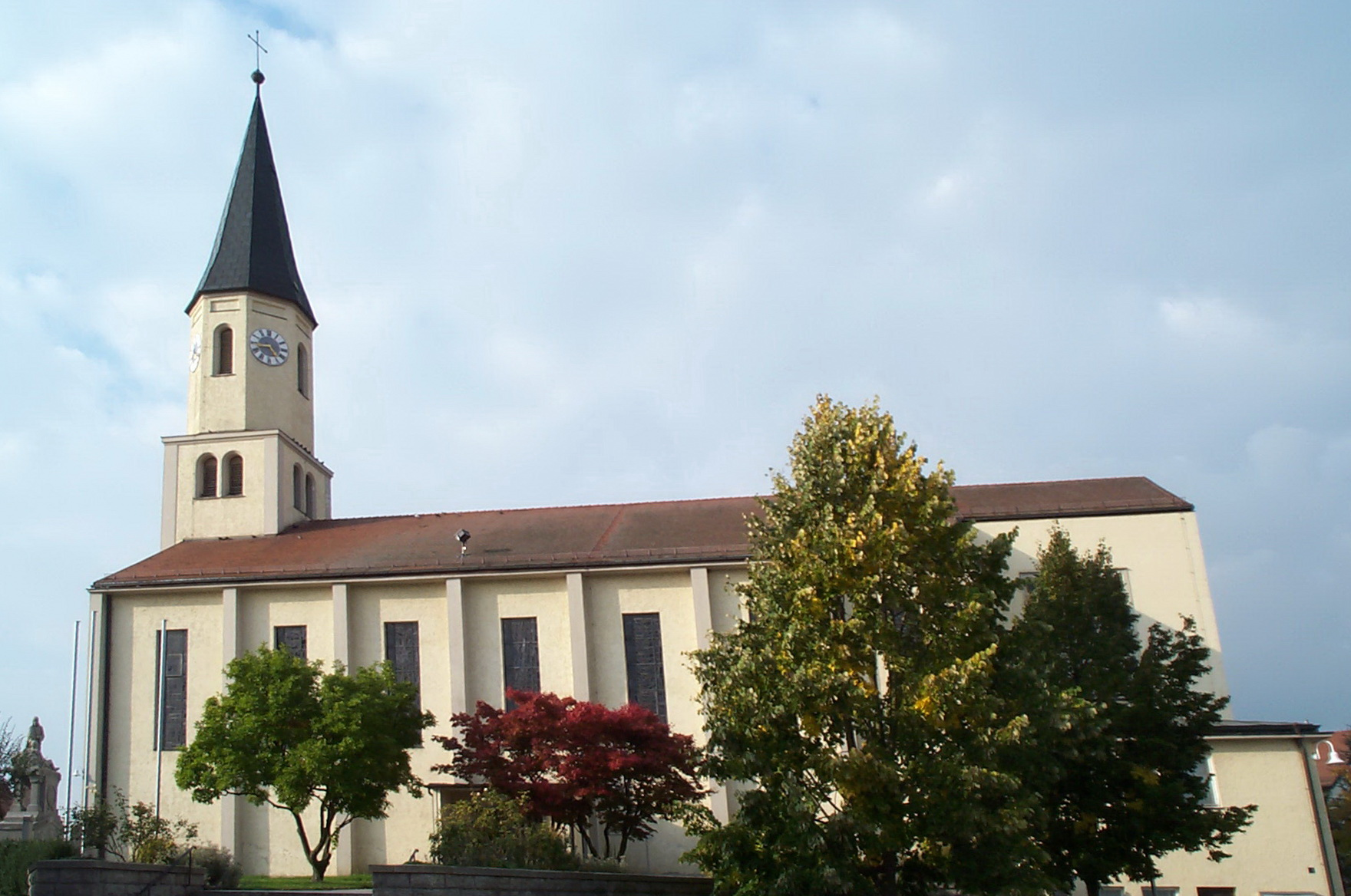 Leiblfing, Straubinger Straße 11. Turm der kath. Pfarrkirche Mariae Himmelfahrt, im Kern spätes 17. Jh., 1847 zur heutigen Gestalt überformt (Langhaus und Chor 1959 neu erbaut); Teile der historischen Ausstattung.